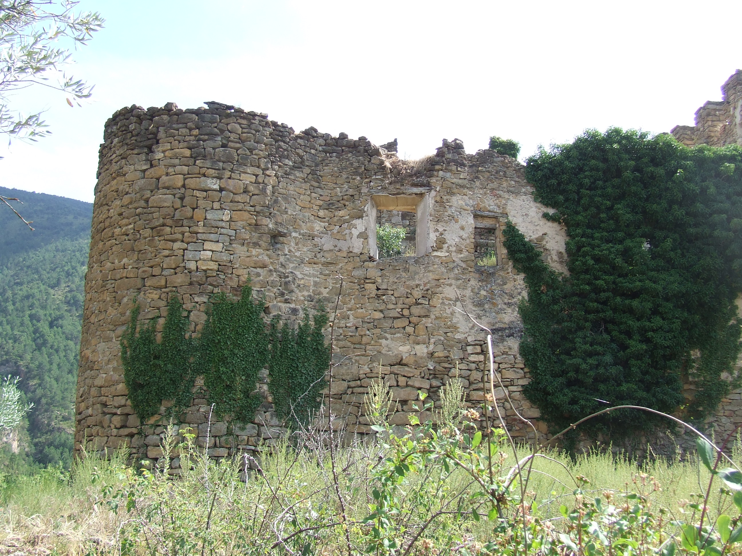 Restes del Castell d'Aramunt (Conca de Dalt, Pallars Jussà)